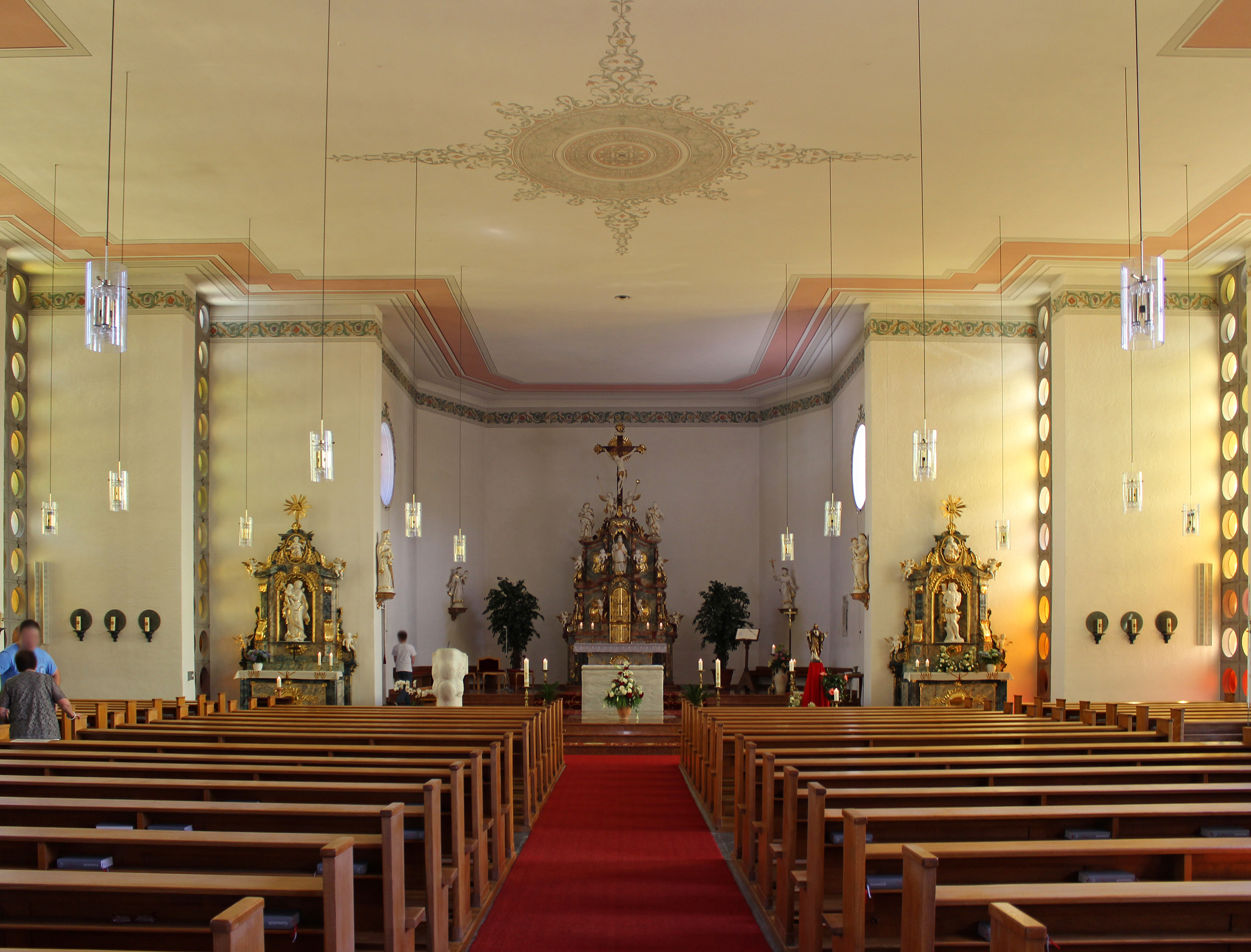 Blick ins Innere der katholischen Pfarrkirche St. Remigius, Freisen, Landkreis St. Wendel, Saarland